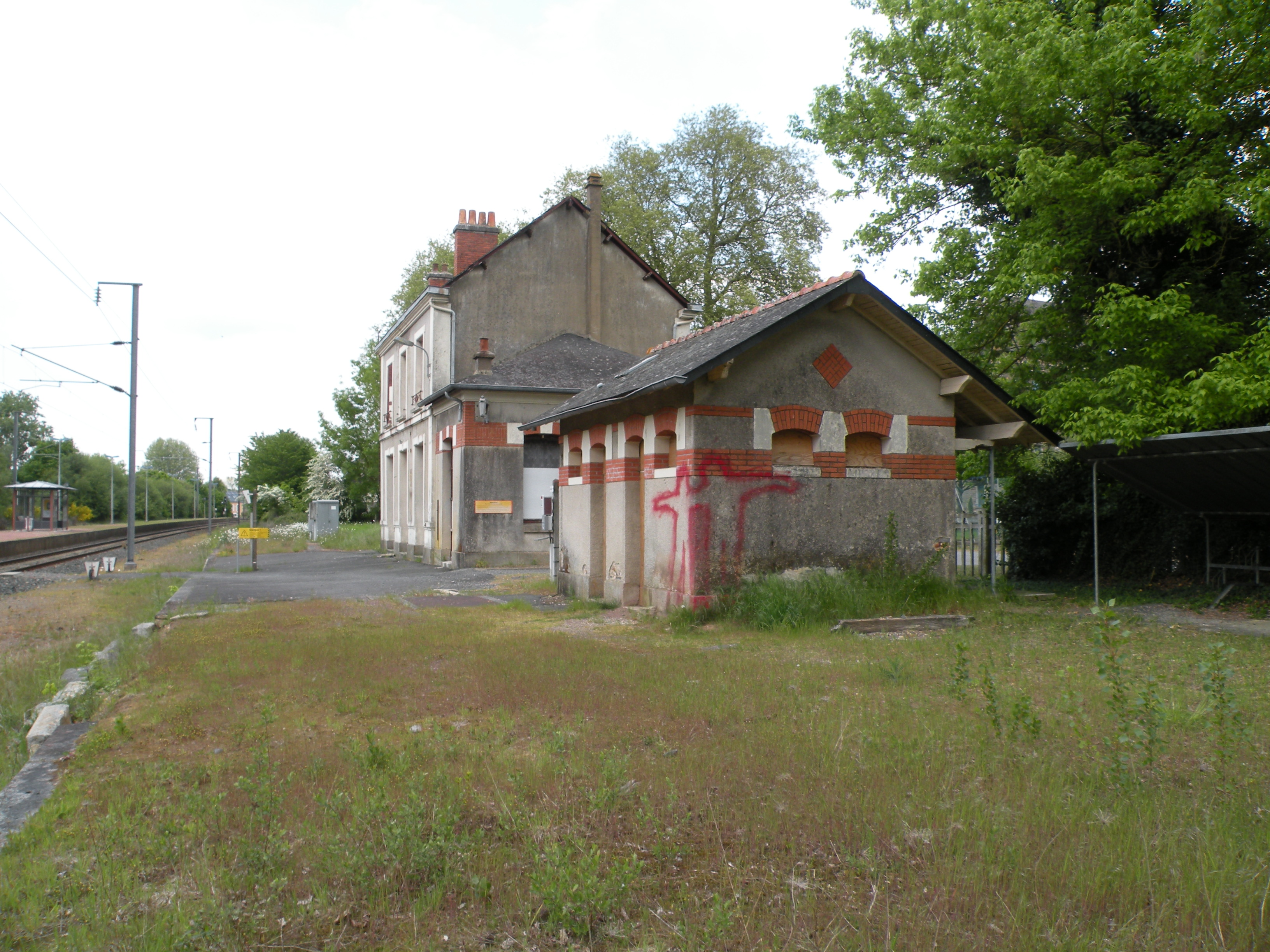 La gare de Beslé à Guémené-Penfao.